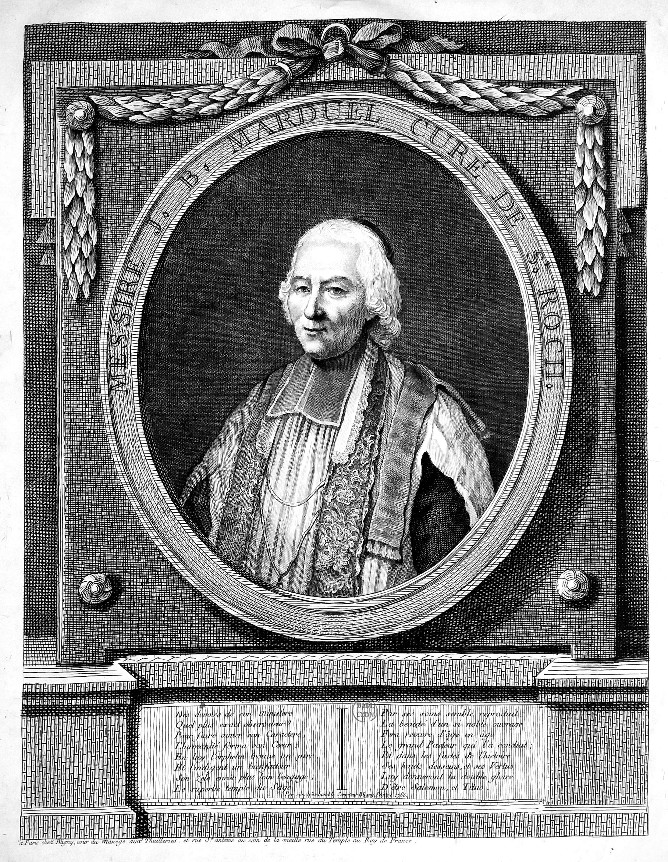 Estampe : J.-B. Marduel, curé de St-Roch, par Bligny (1765). Bibliothèque municipale de Lyon, cote : Est Coste 14387.